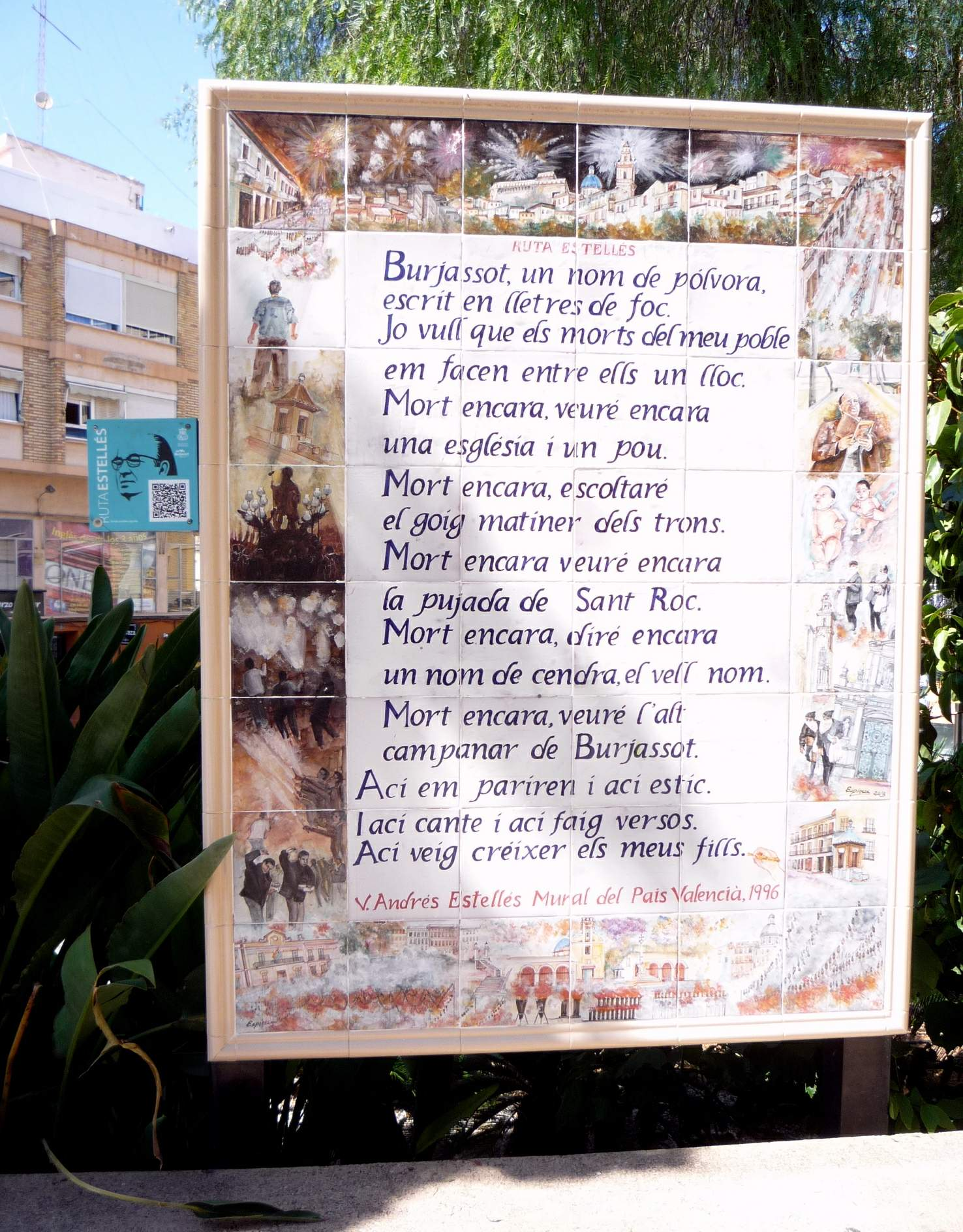 Burjassot (Valencia) - Plaça Emilio Castelar